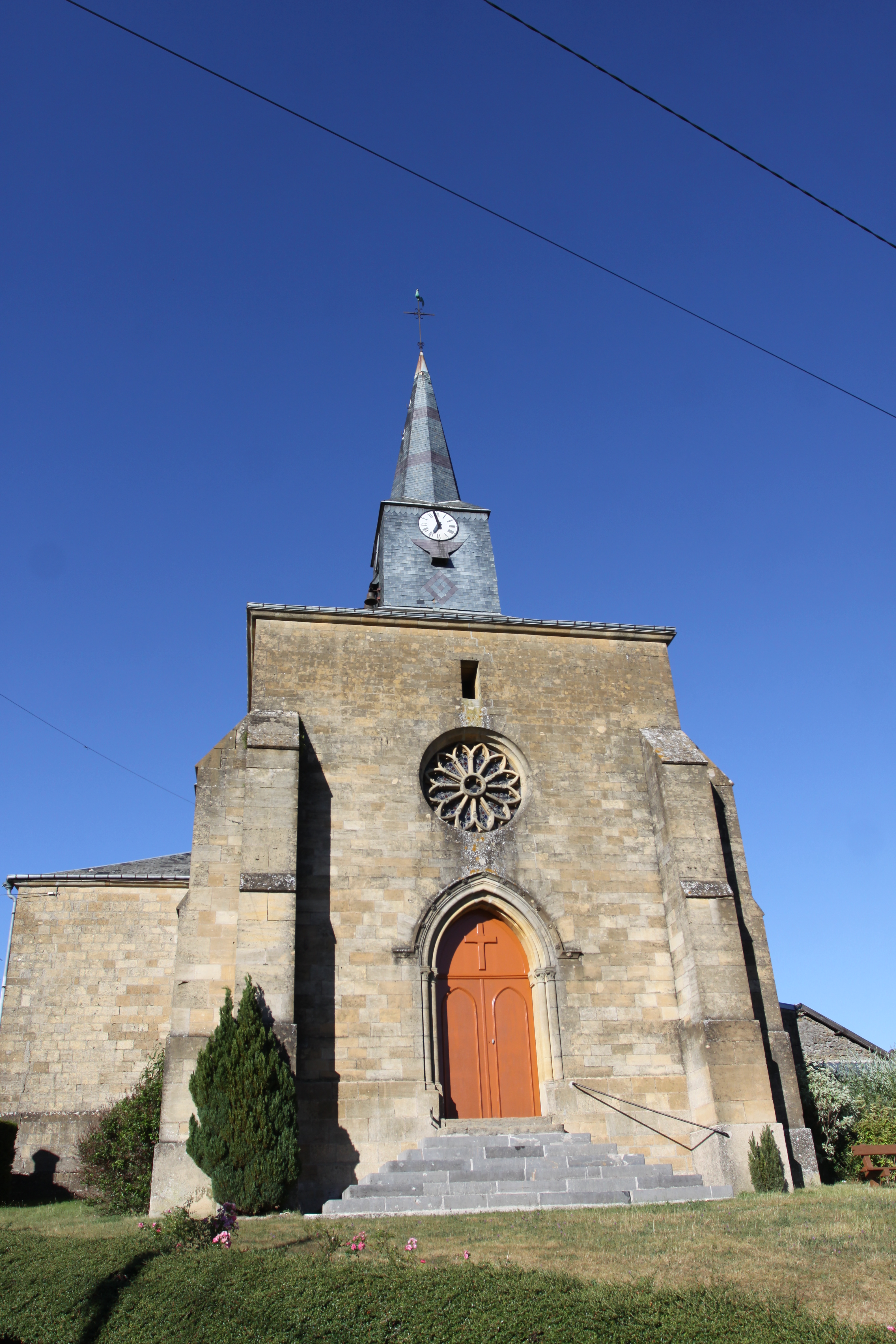 Village Ardennais